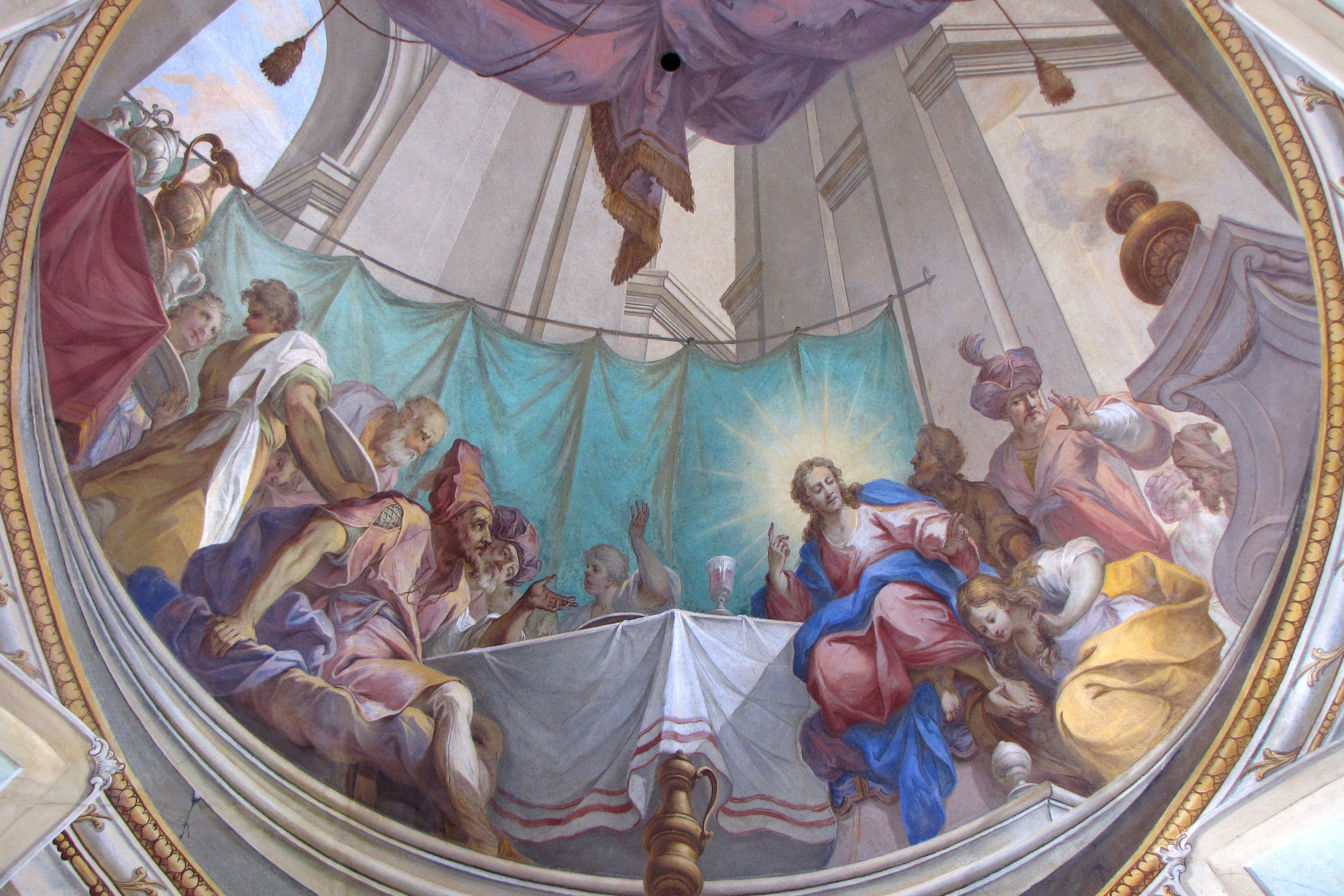 Chorfresko in der Kirche von Thalhofen (Ostallgäu) von Joseph Keller